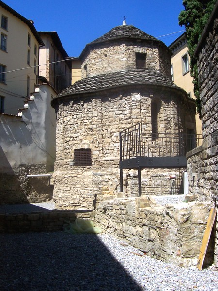 Bergamo - Tempietto di S. Croce